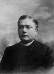 František Soukal (1866 - 1938), Český římskokatolický kněz a básník a spisovatel.